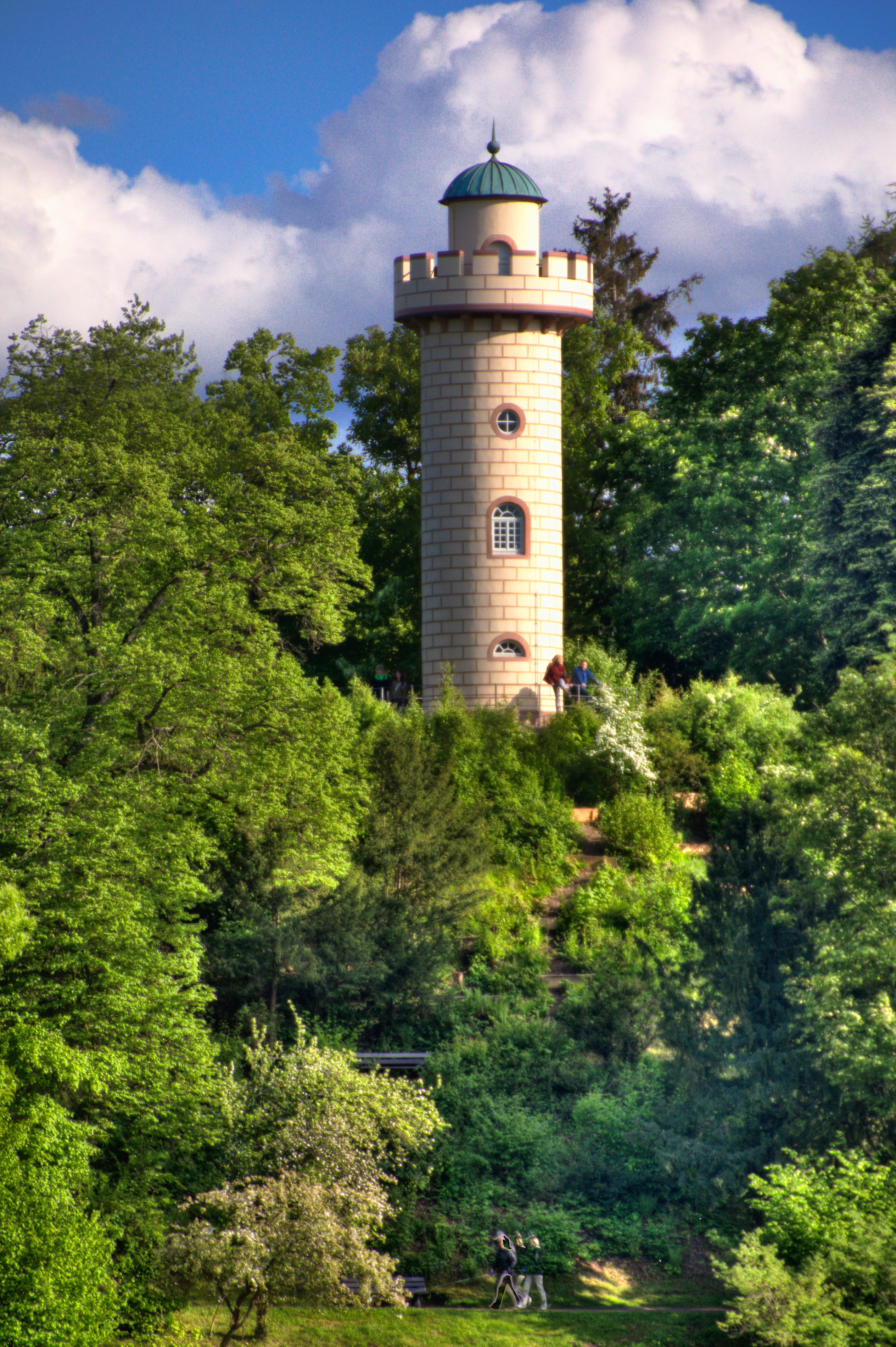 Rapunzelturm im Park Schönbusch in Aschaffenburg/Bayern